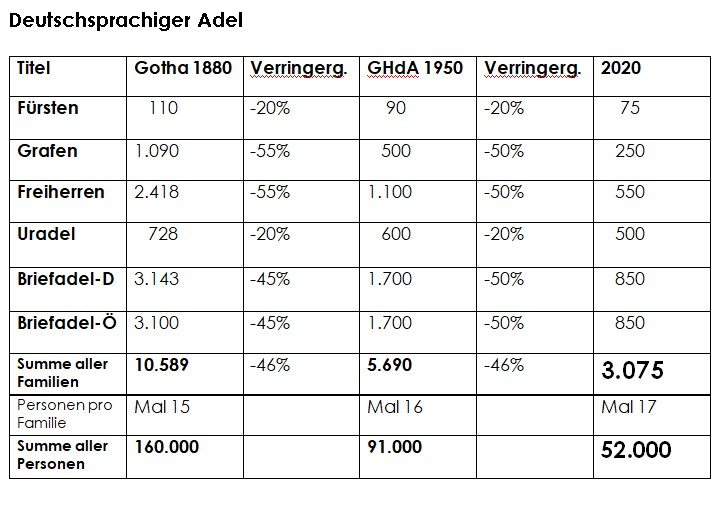 Personenanzahl des deutschsprachigen Adels